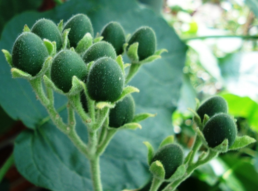 unripe fruits of Solanum abutiloides